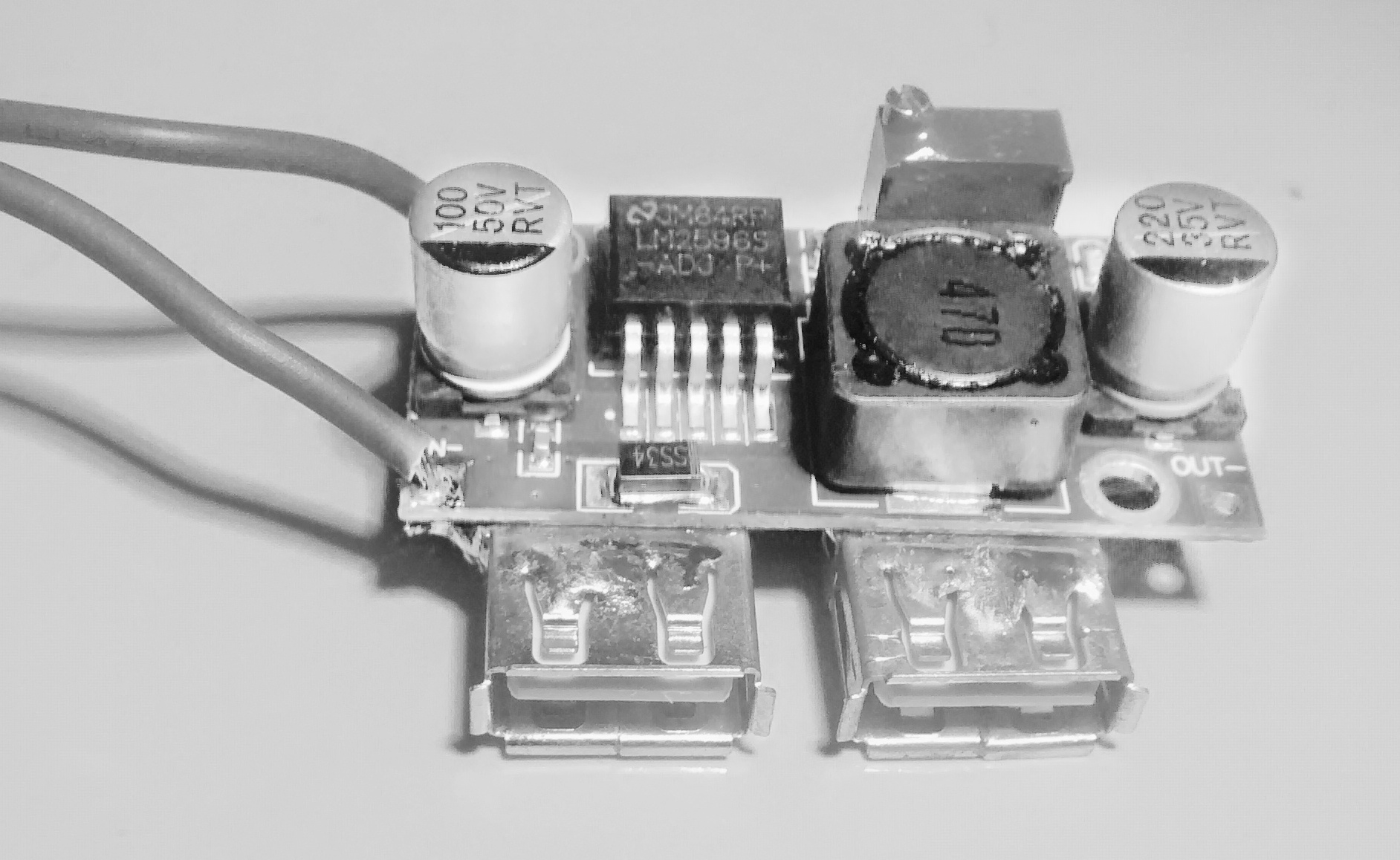 Abwärtswandler 3A USB-Ausgang